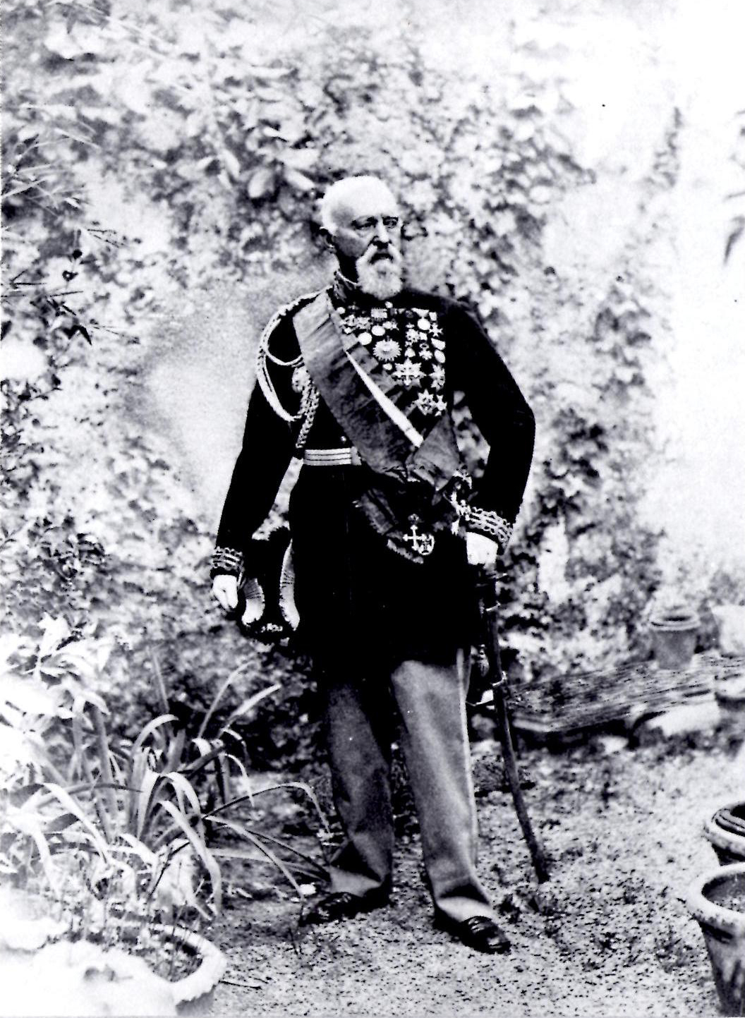 generale Domenico Cucchiari